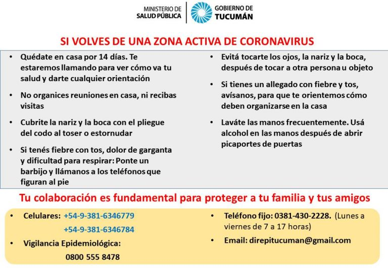 Recomendaciones sobre el coronavirus del gobierno de Tucuman